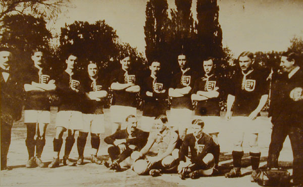 Photographie de l'équipe de Hongrie de football en 1918 contre celle d'Autriche